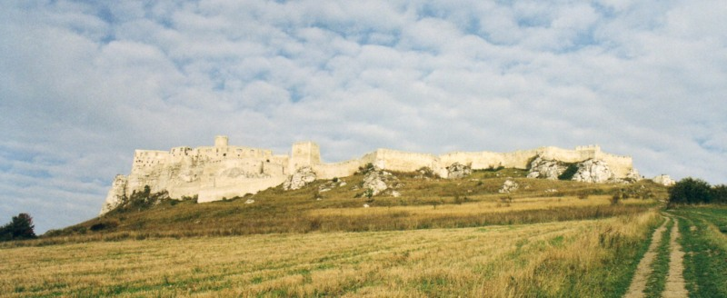 Die Zipser Burg in der Slowakei